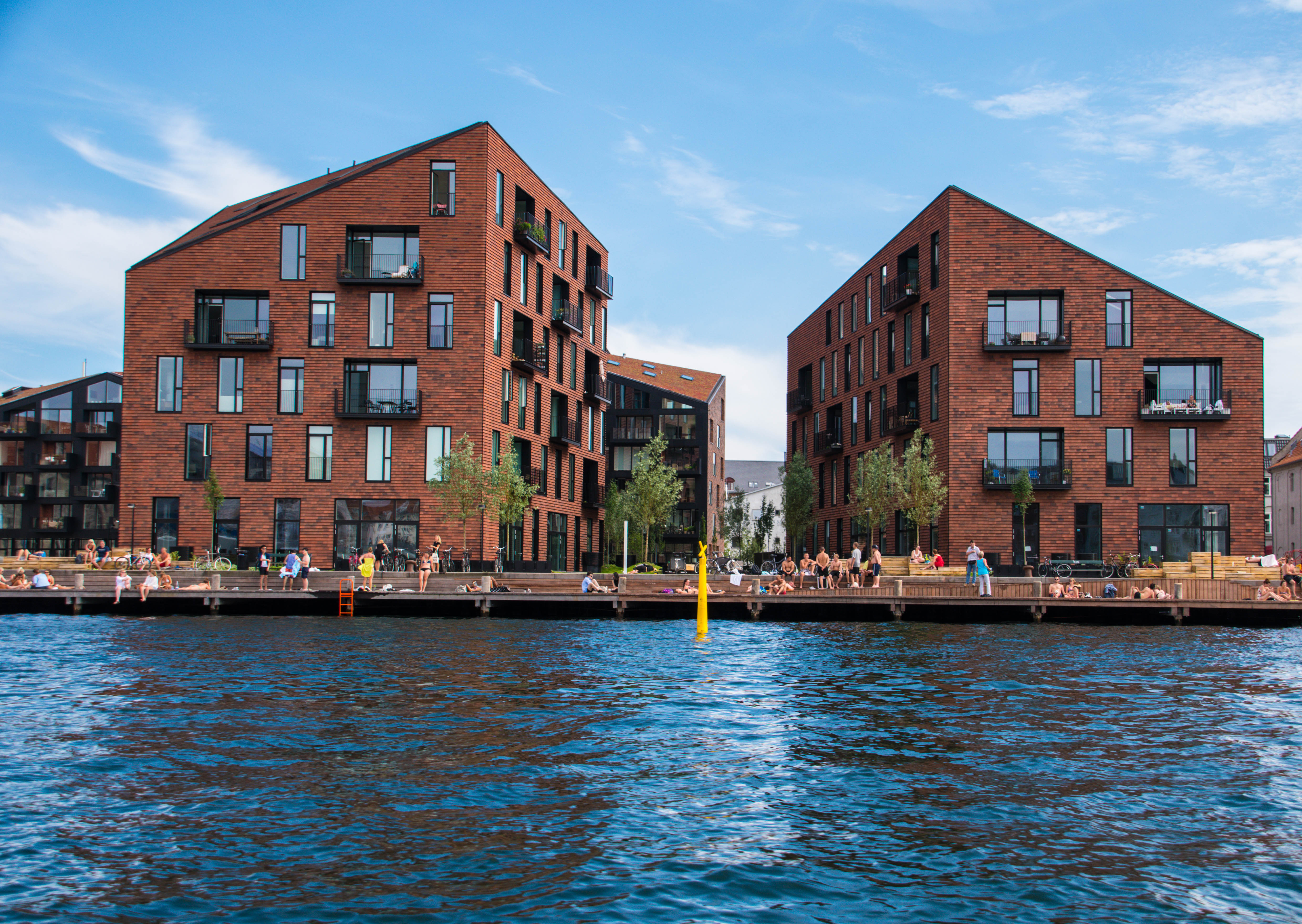 Krøyers Plads in Copenhagen, Denmark